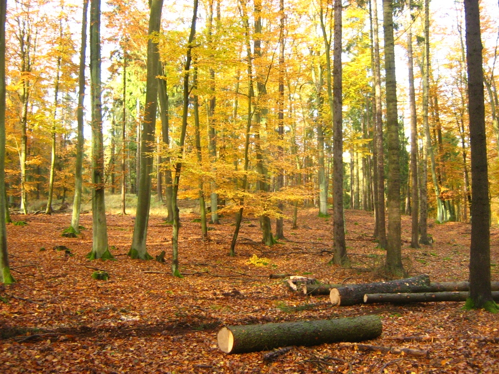 Brohmer Berge bei Rothemühl (Landkreis Uecker-Randow, Vorpommern).